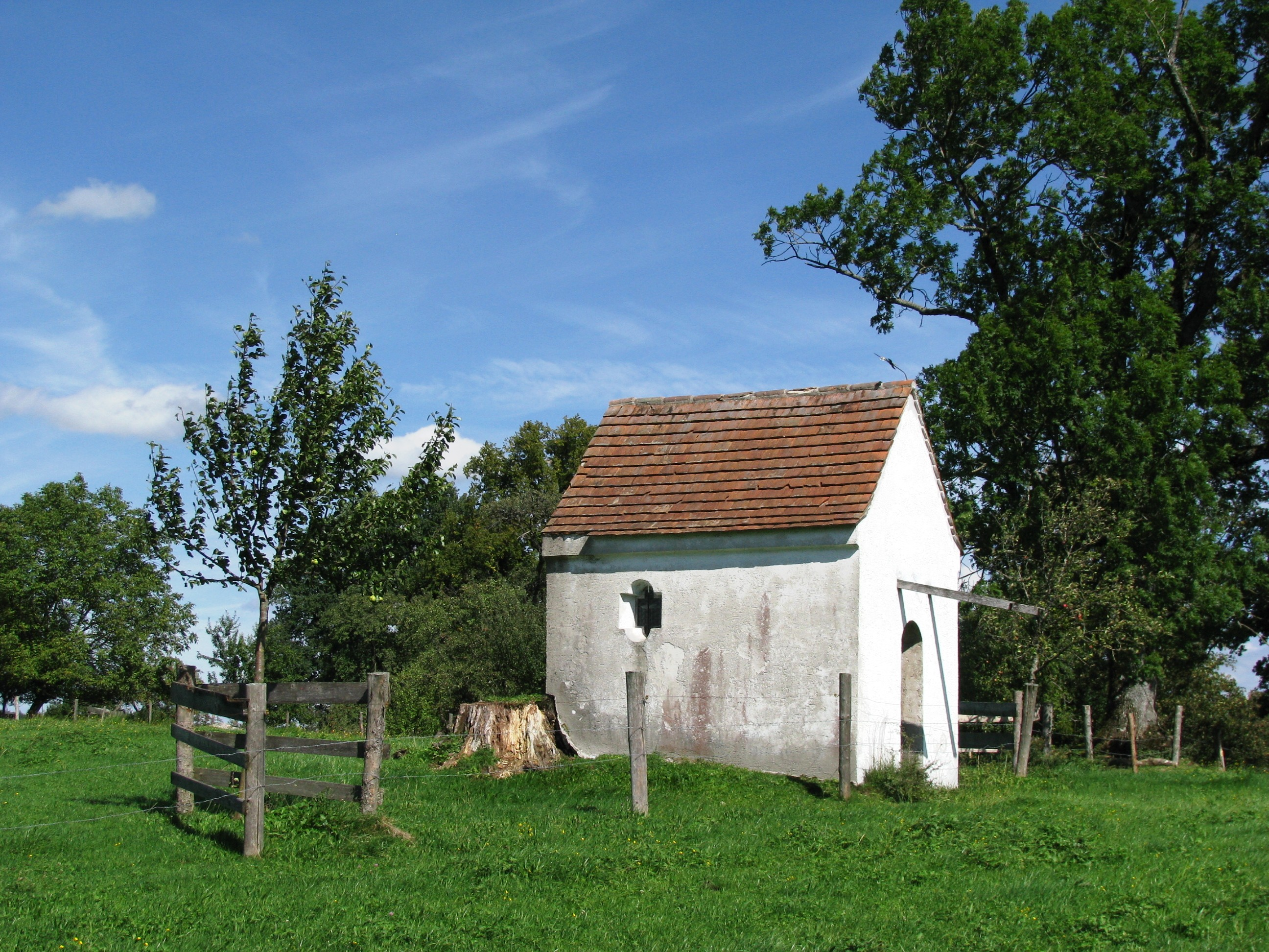 Feldkapelle bei Filzbuch, Gemarkung Beuerberg, Satteldachbau, 2. Hälfte 18. Jh.